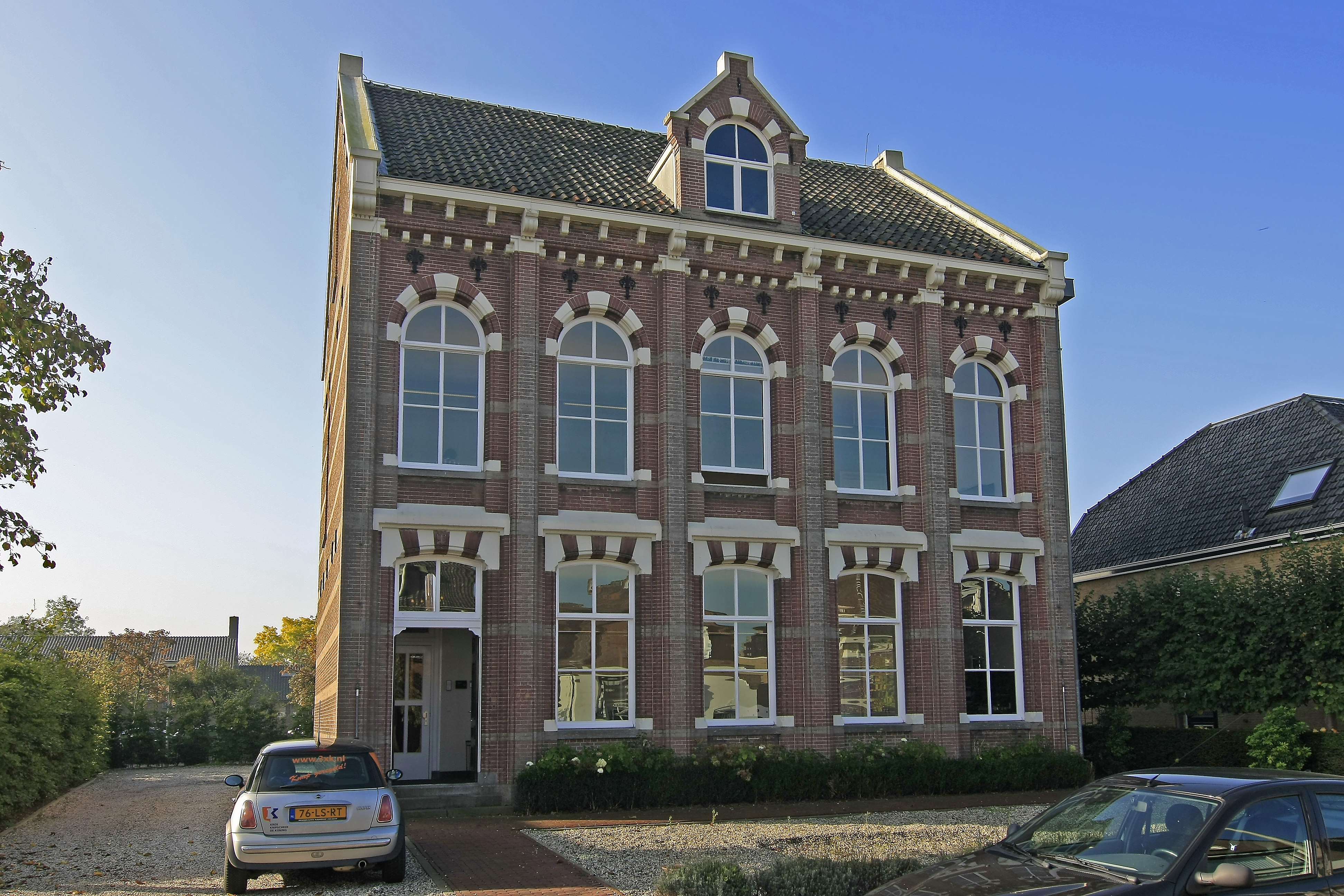 Historisch pand